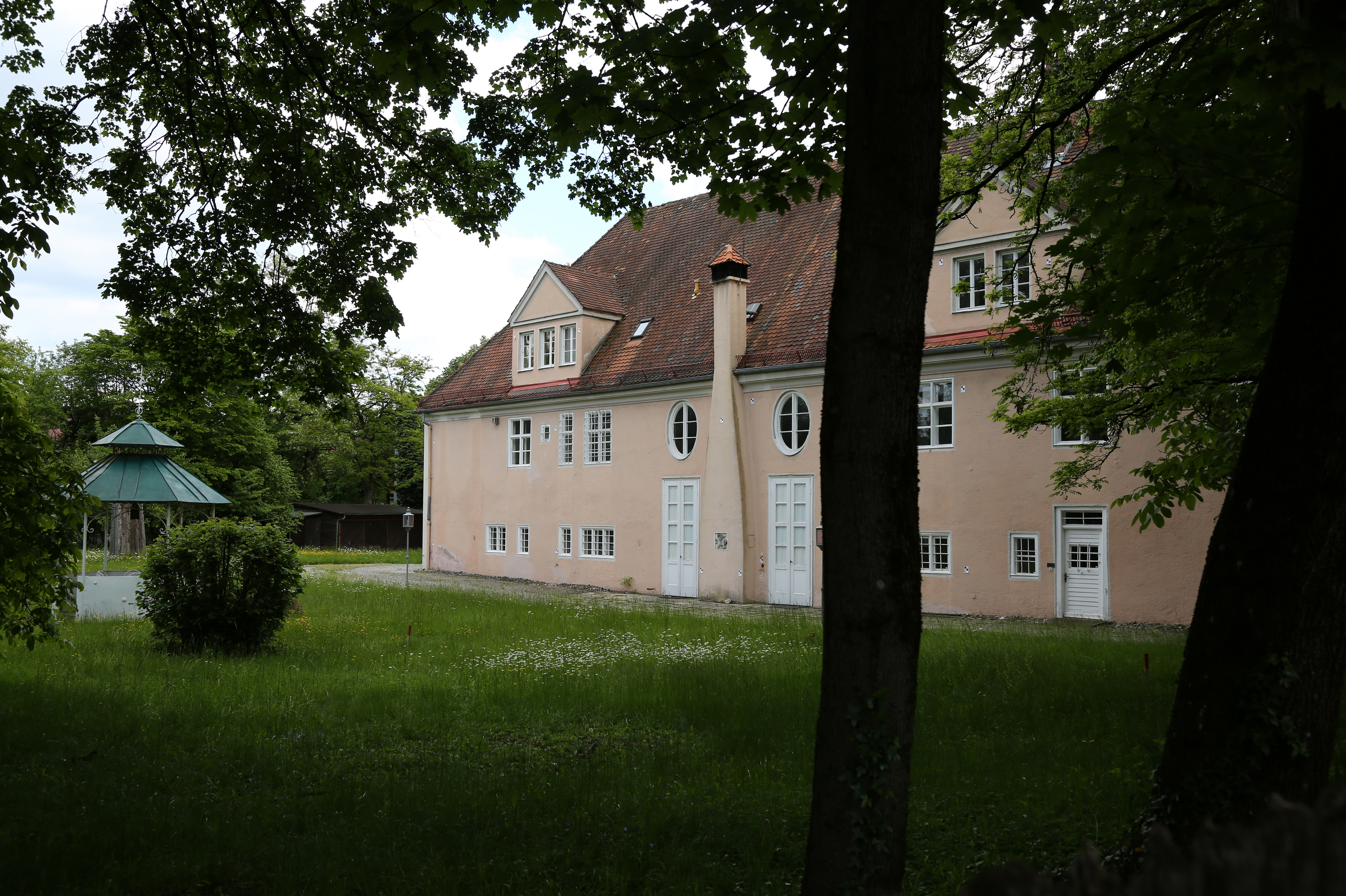 Das Laimer Schlössl ist ein denkmalgeschütztes Gebäude an der Agnes-Bernauer-Straße in München-Laim. Es war Wohnsitz von Agnes Bernauer und im 20. Jahrhundert von Theodor Fischer.